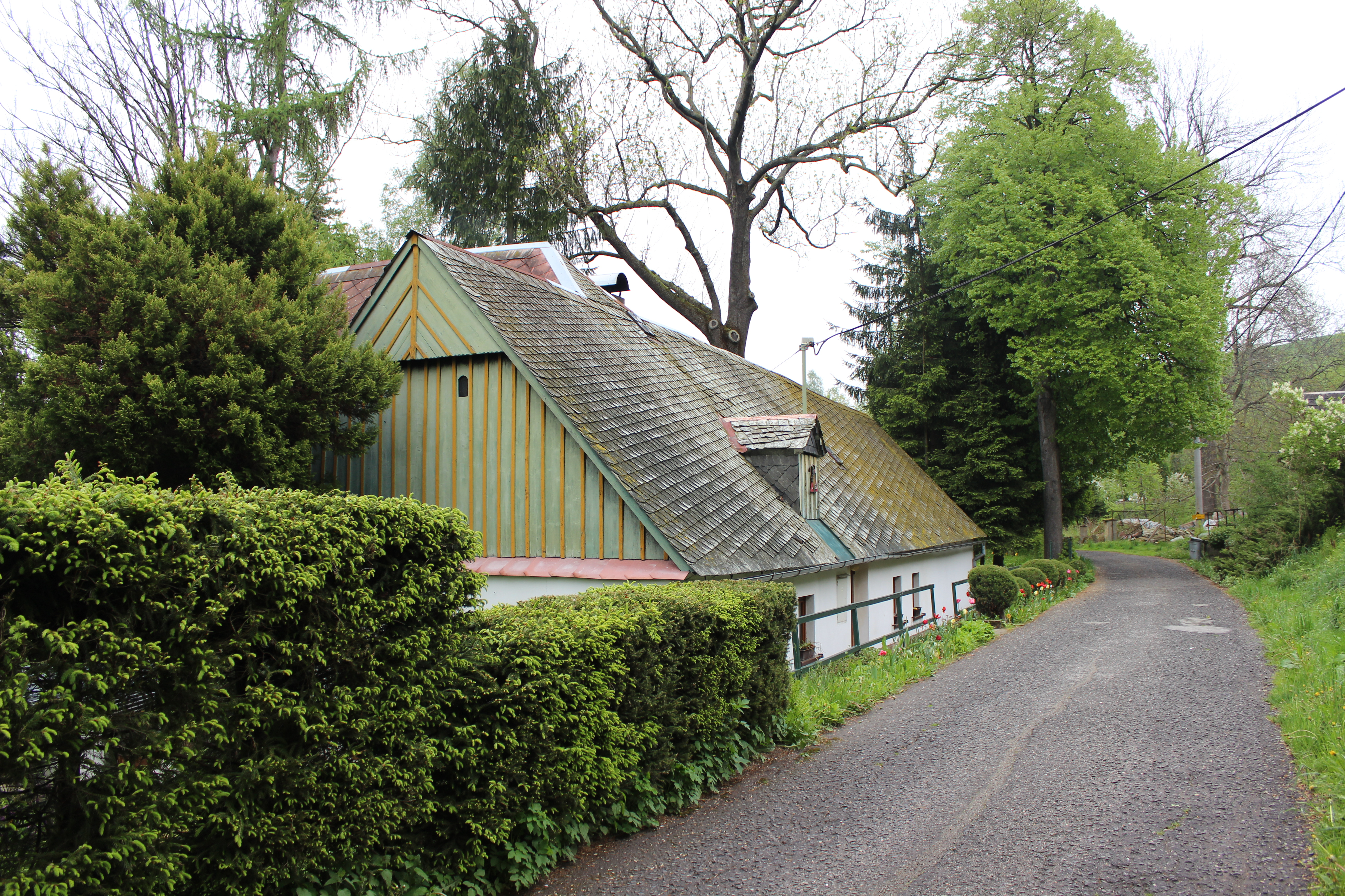 Dům evidenční číslo 30 v Pekle, části Raspenavy (pohled od jihozápadu). V domě pobýval také Václav Kaplický.